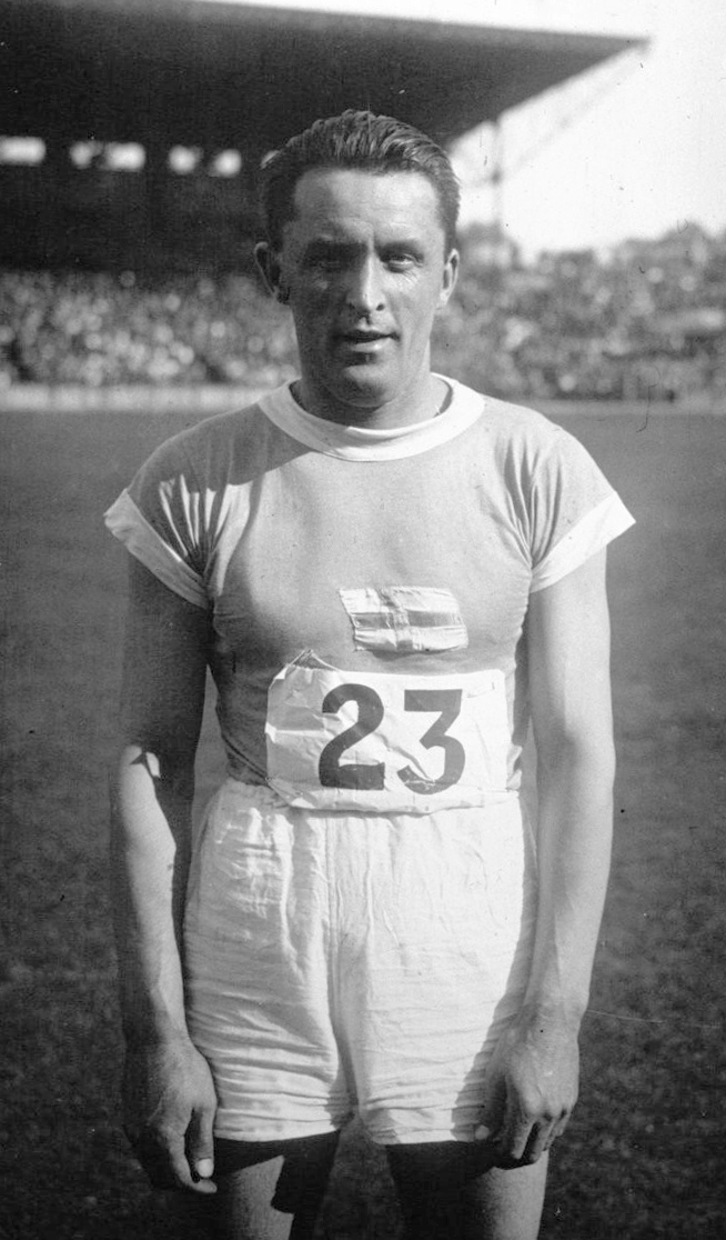 Colombes : Vilen (23), Filnandais (portrait à 3 m) : [photographie de presse] / Agence Meurisse